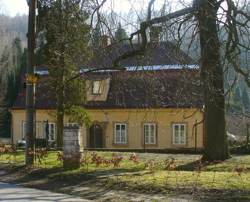 Fara v Bělé, Děčín.